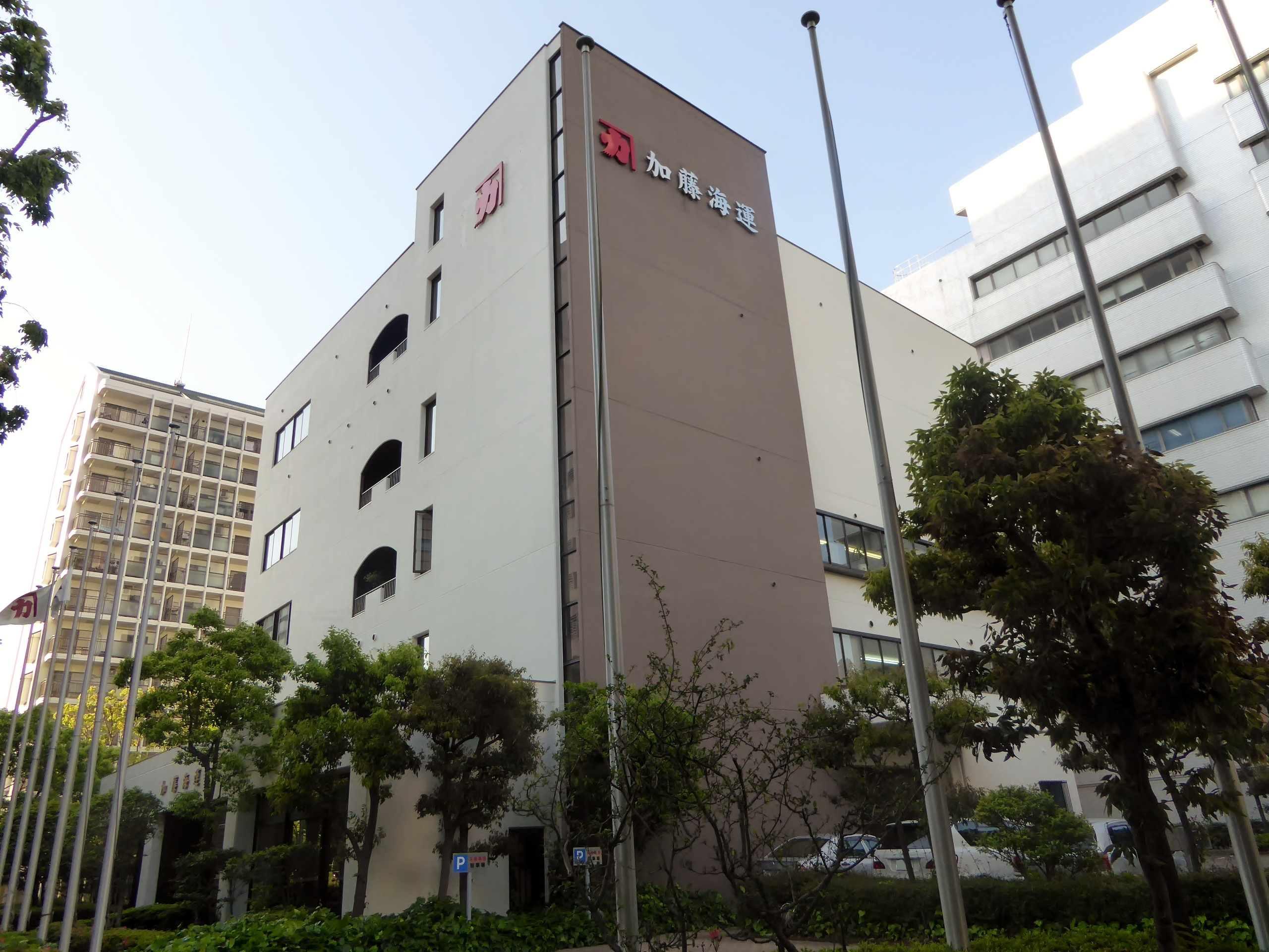 加藤海運株式会社本社を撮影。